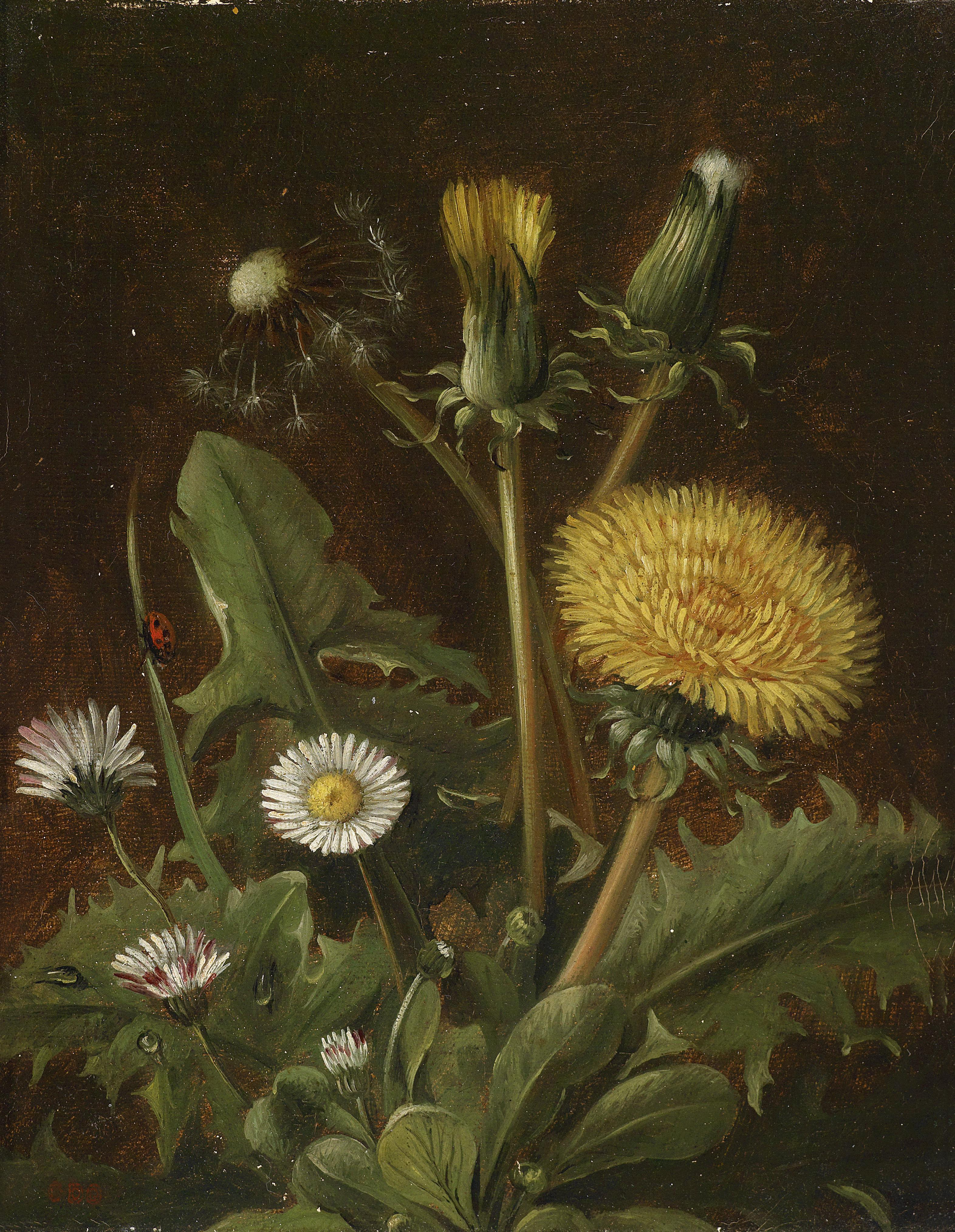 Stillleben mit Löwenzahn, monogrammiert O. D. O., Öl auf Leinwand auf Karton, 21,5 x 17 cm